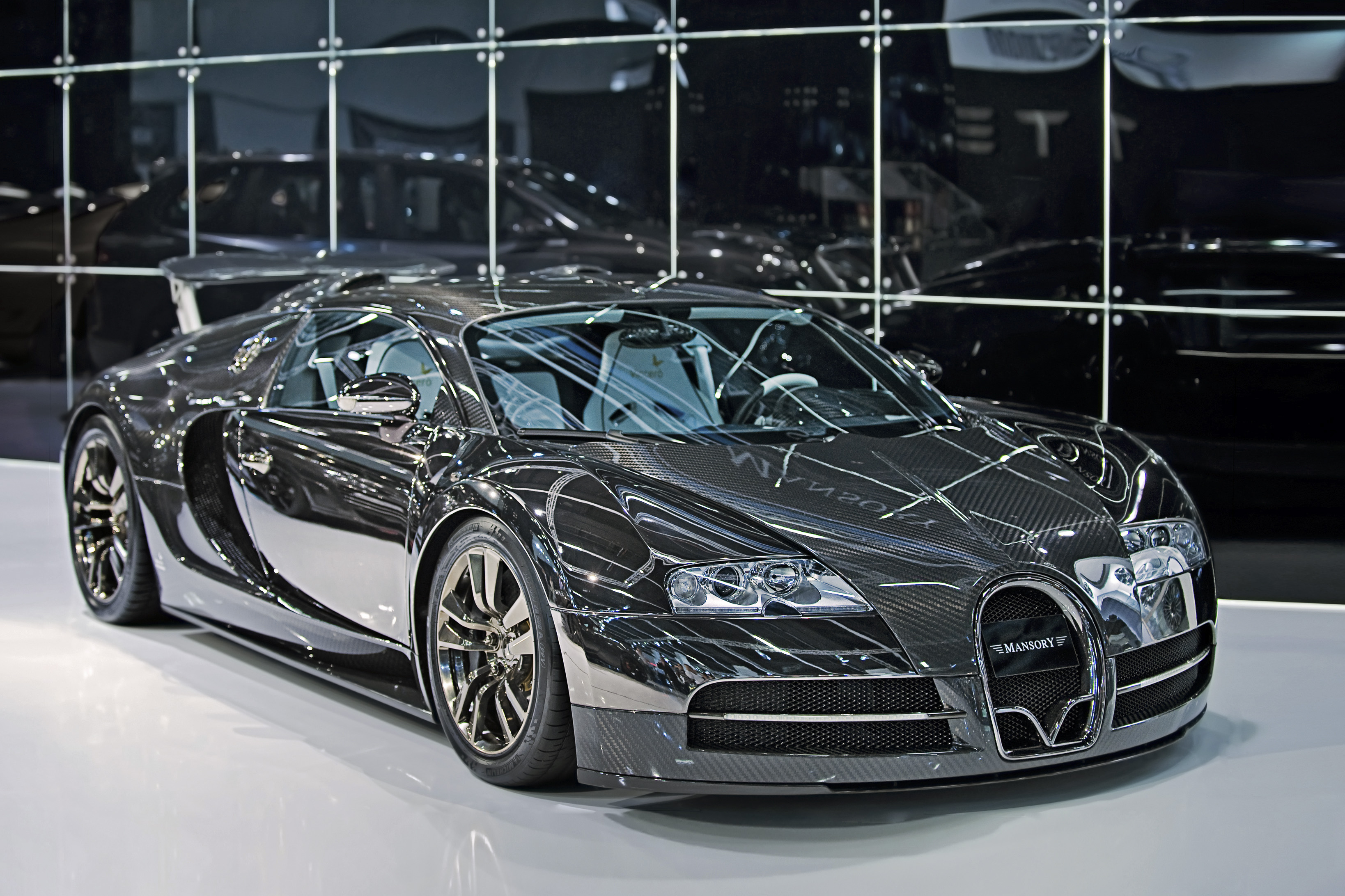 Bugatti Veyron bei der IAA 2009 in Frankfurt, eine Version vom Edeltuner Mansory aus der Schweiz.